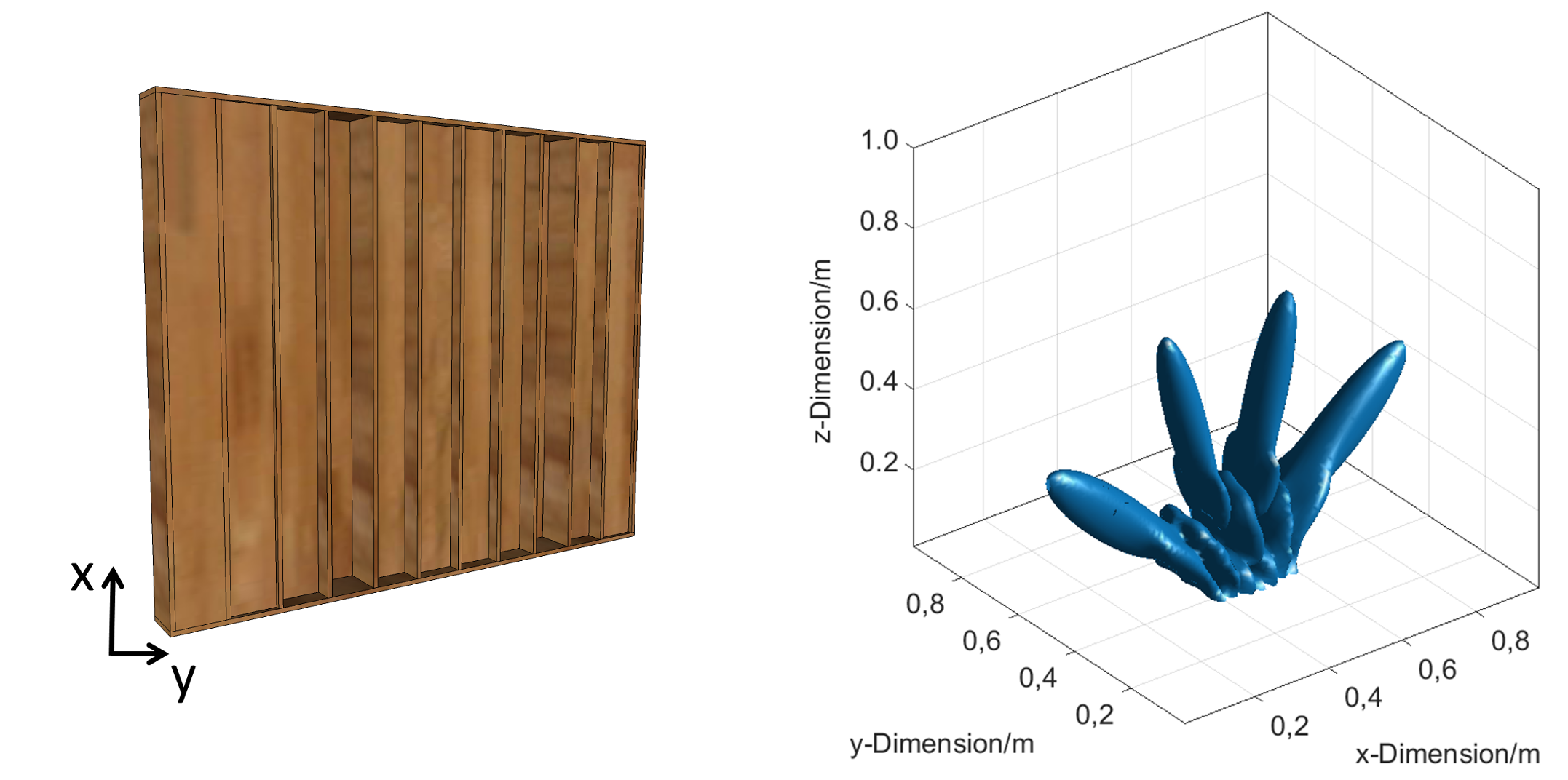 Eindimensionaler QRD Diffusor und simulierte, dreidimensionale Schalldruckverteilung beim Vielfachen der Designfrequenz.